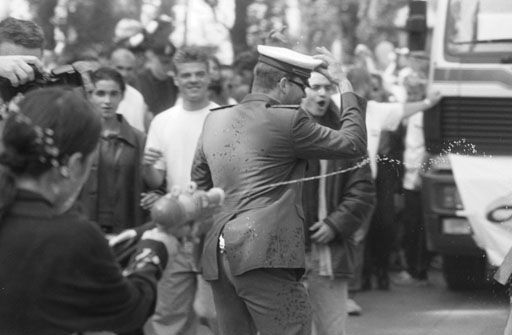 Union Move am 23. Mai 1998 in München auf der Leopoldstraße